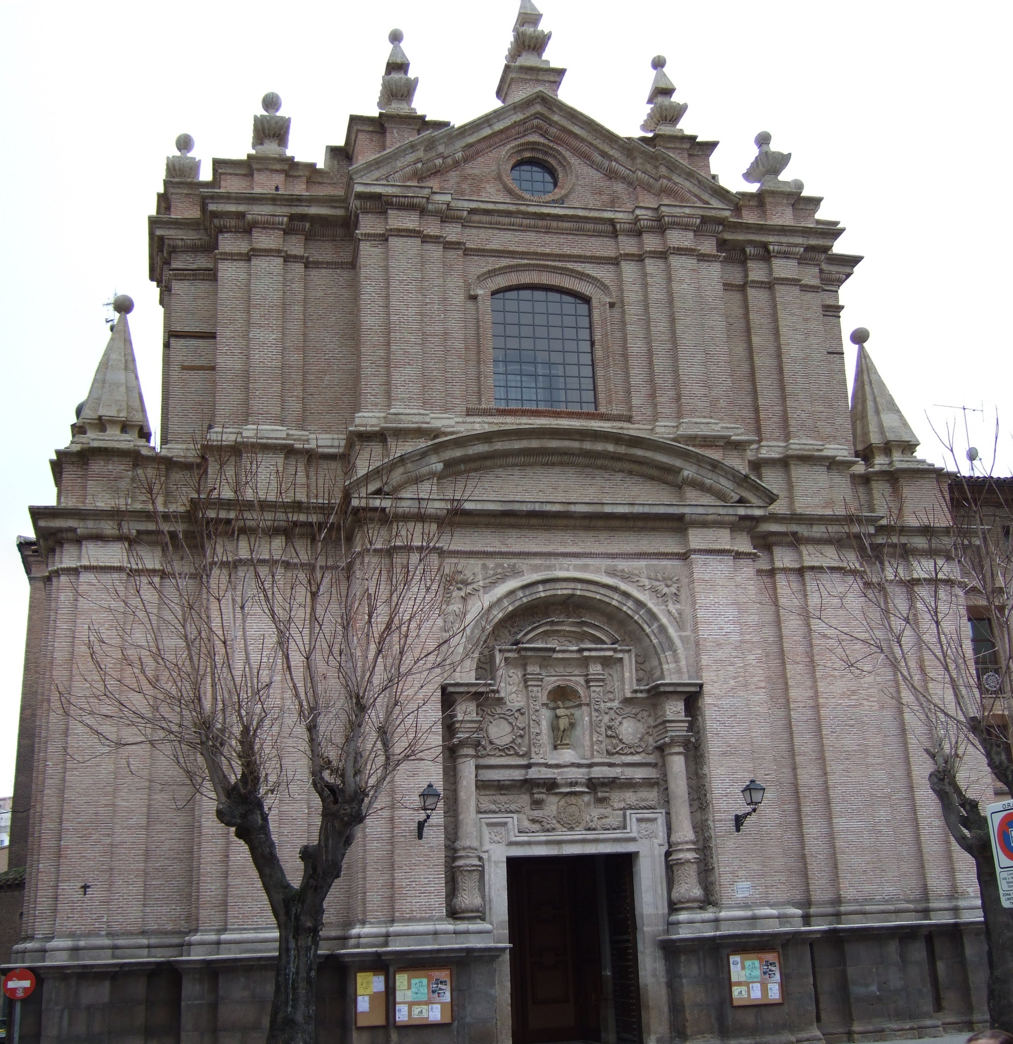 Calatayud - San Juan El Real - Fachada Principal